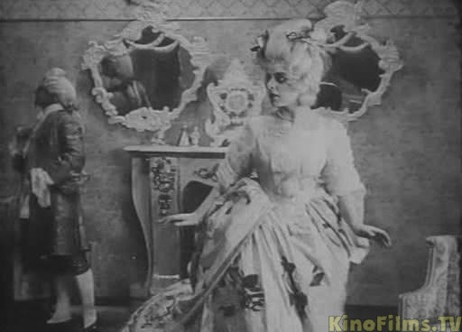 Фильм "Пиковая дама", 1916.